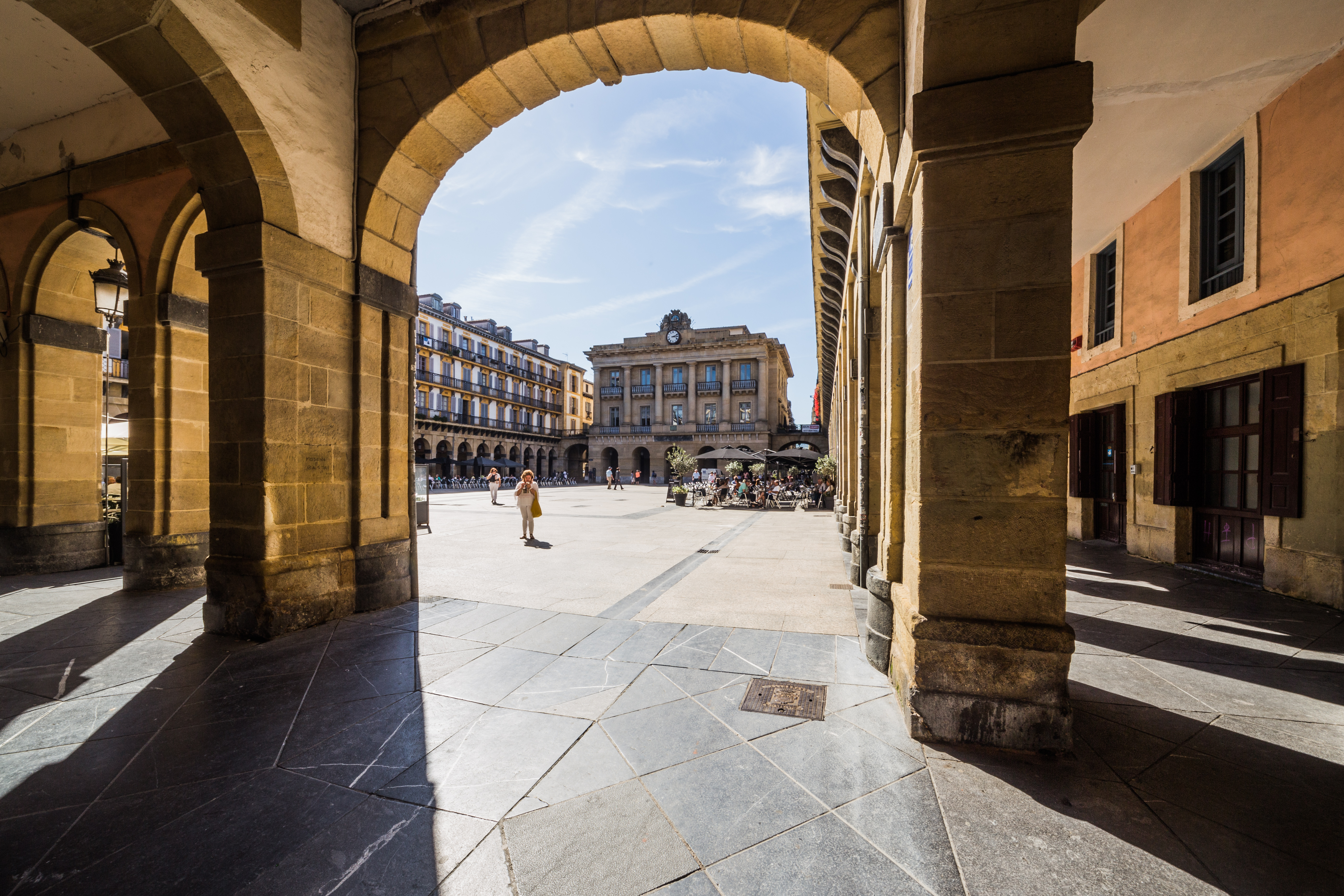 Konstituzio Plaza